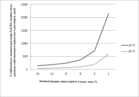 Разложение гипохлорита натрия в водных растворах с течением времени